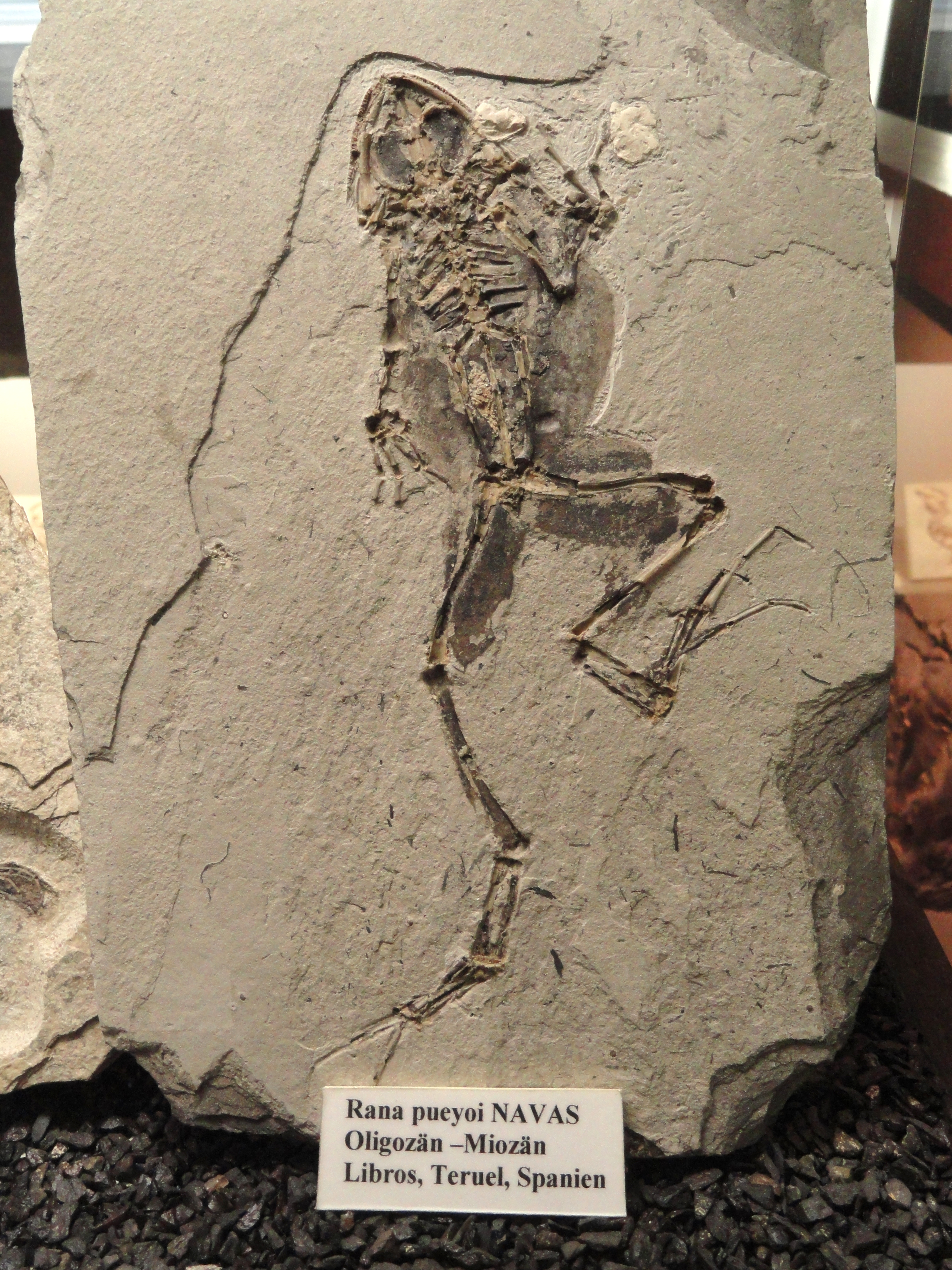 Exhibit in Naturmuseum Senckenberg, Frankfurt am Main, Germany.